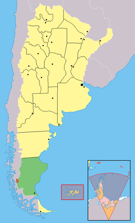 Mapa de Santa Cruz